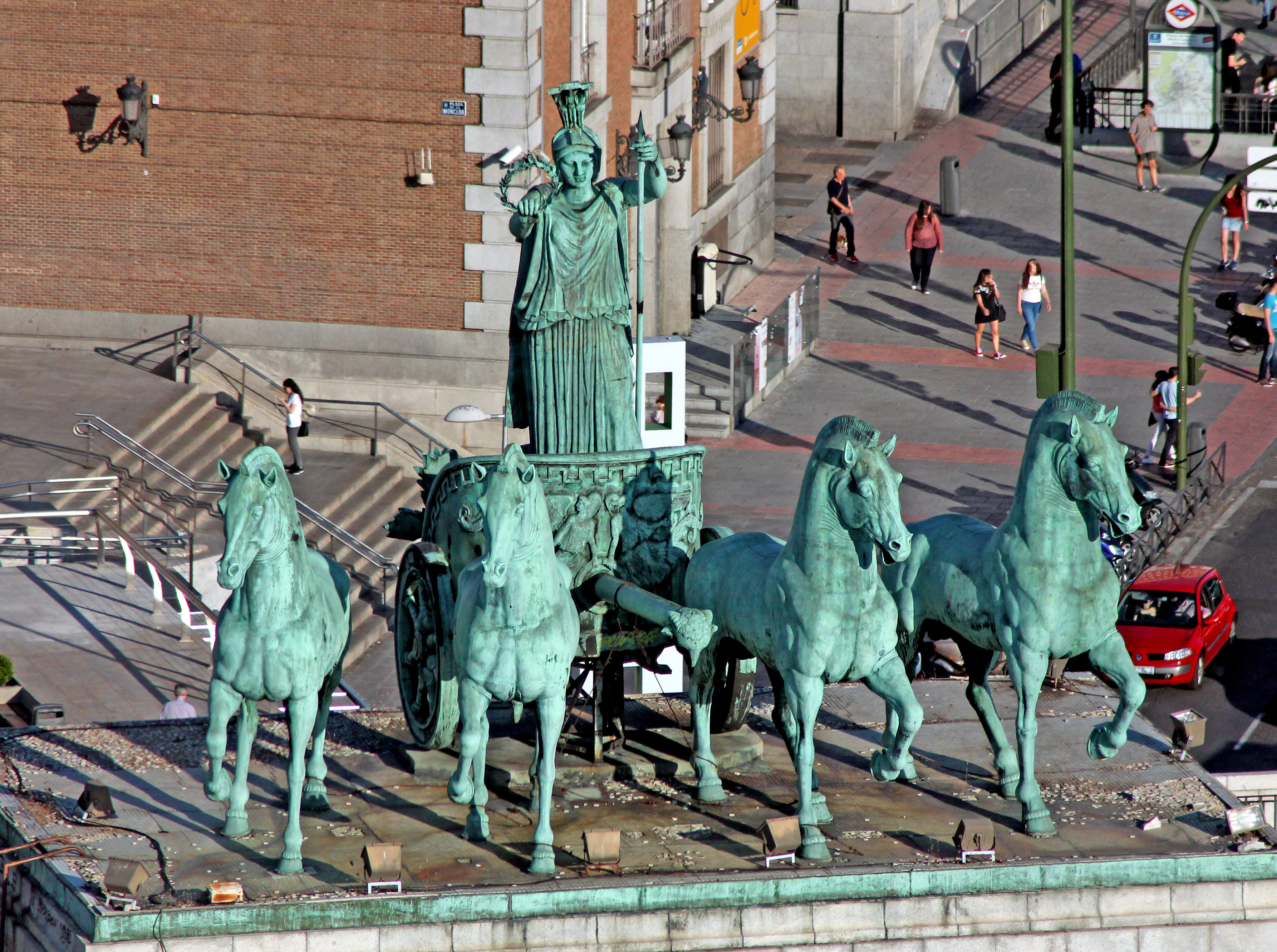 Goddess Minerva driving a quadriga.